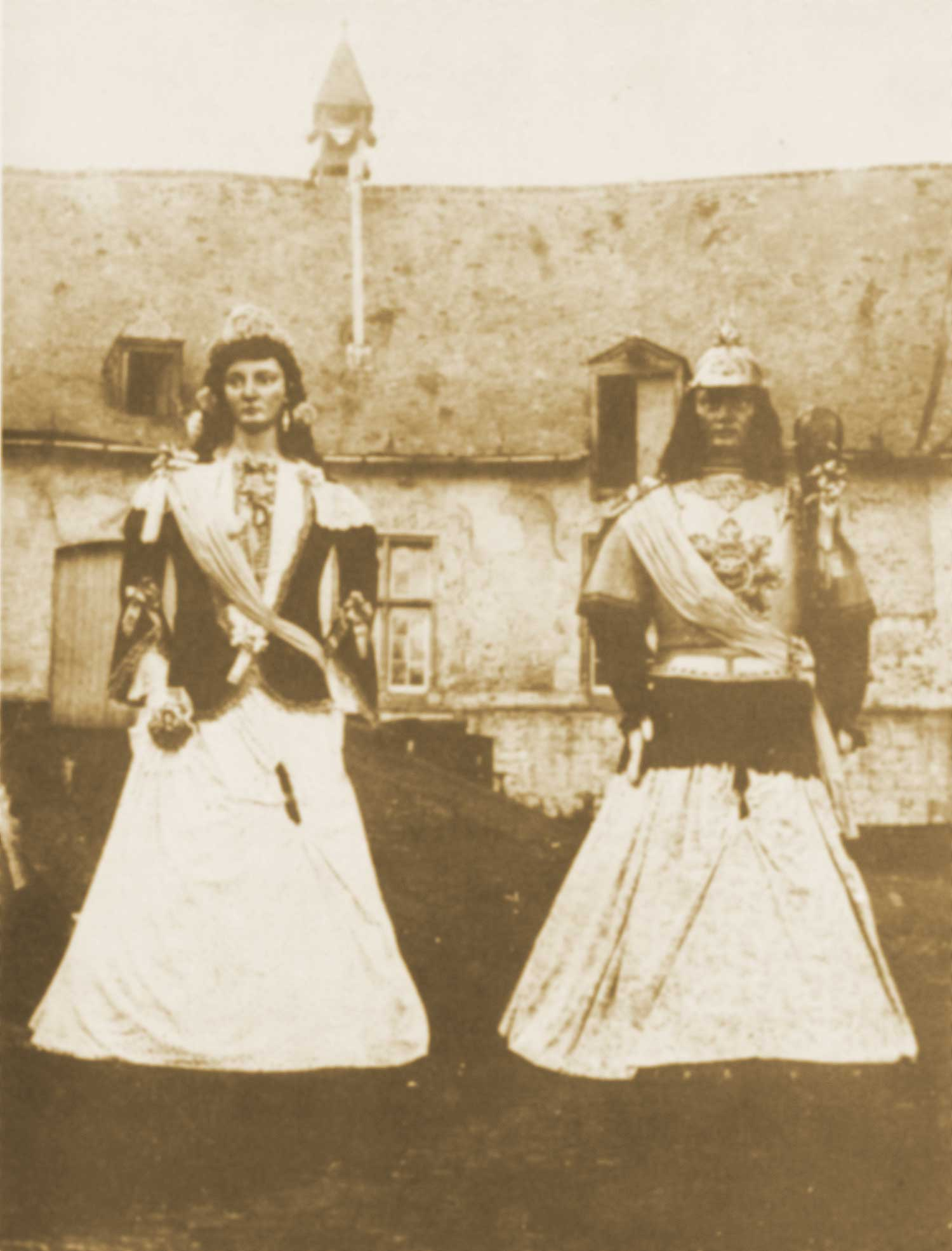 Sortie exceptionnelle des géants d'Ath à l'occasion d'une victoire élctorale